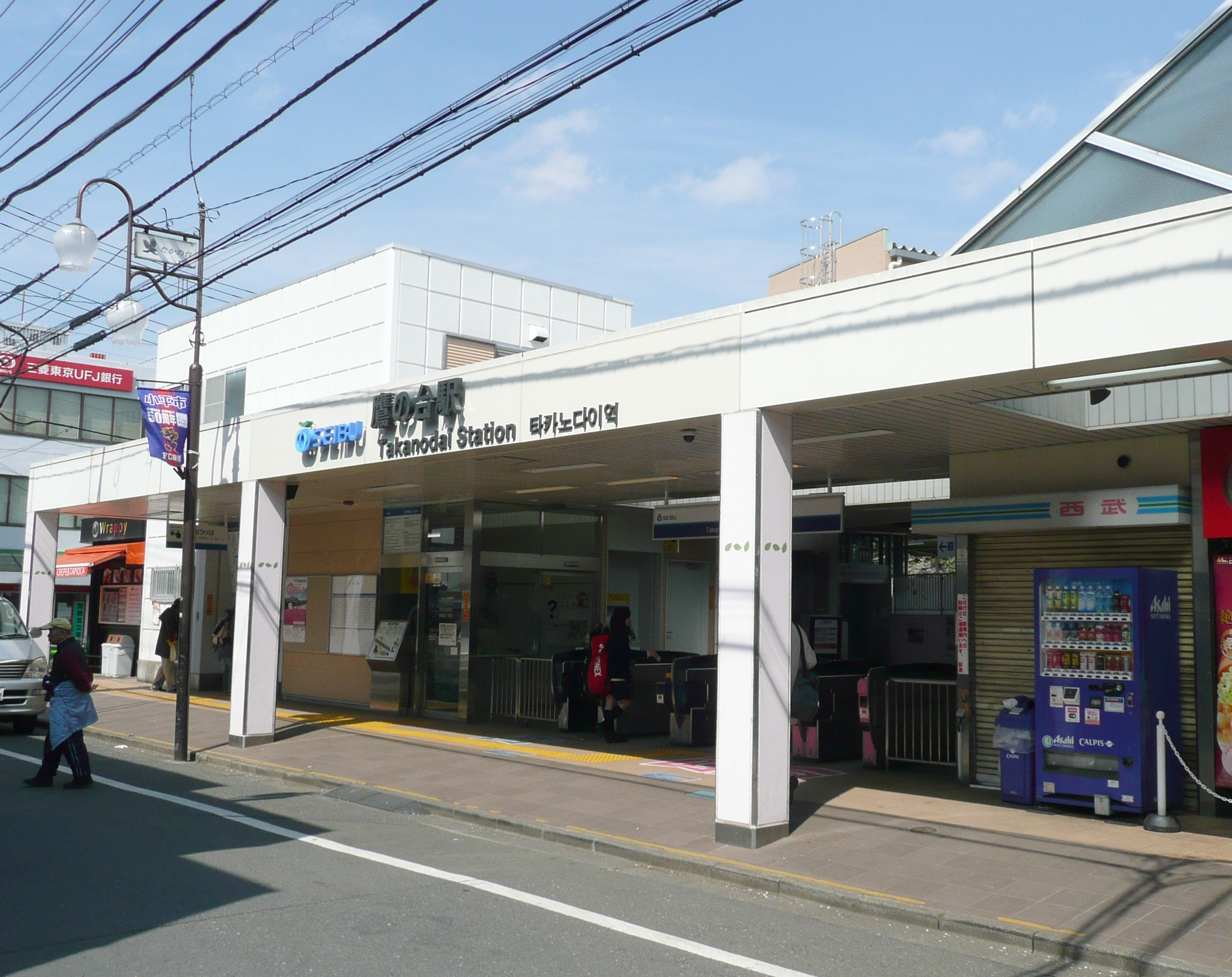 鷹の台駅